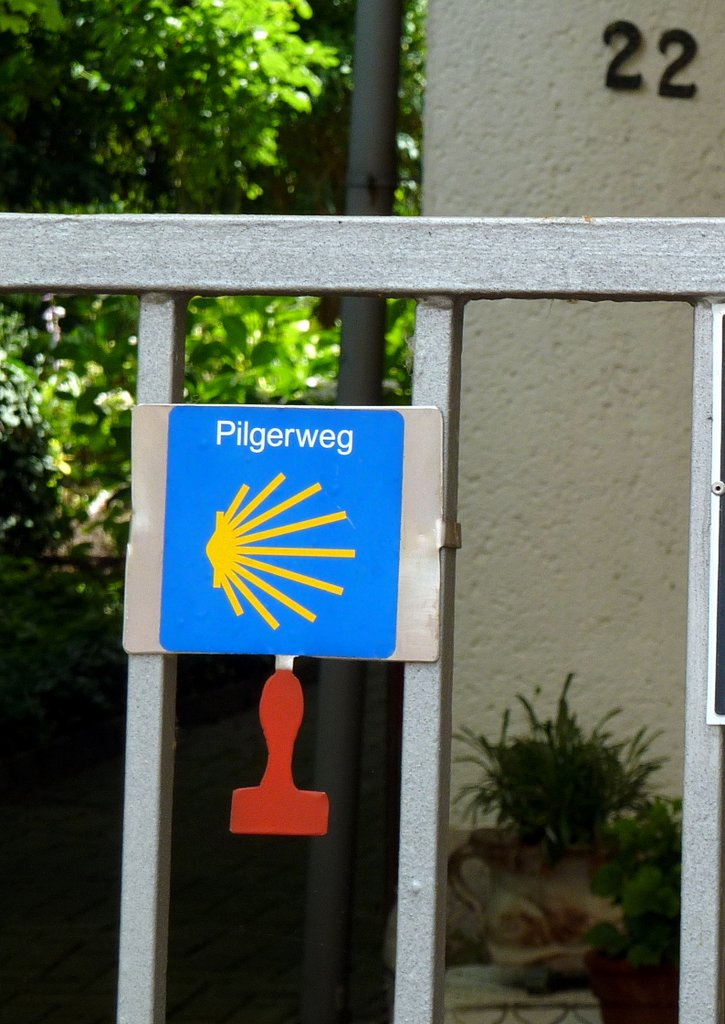 Pilgerstempel